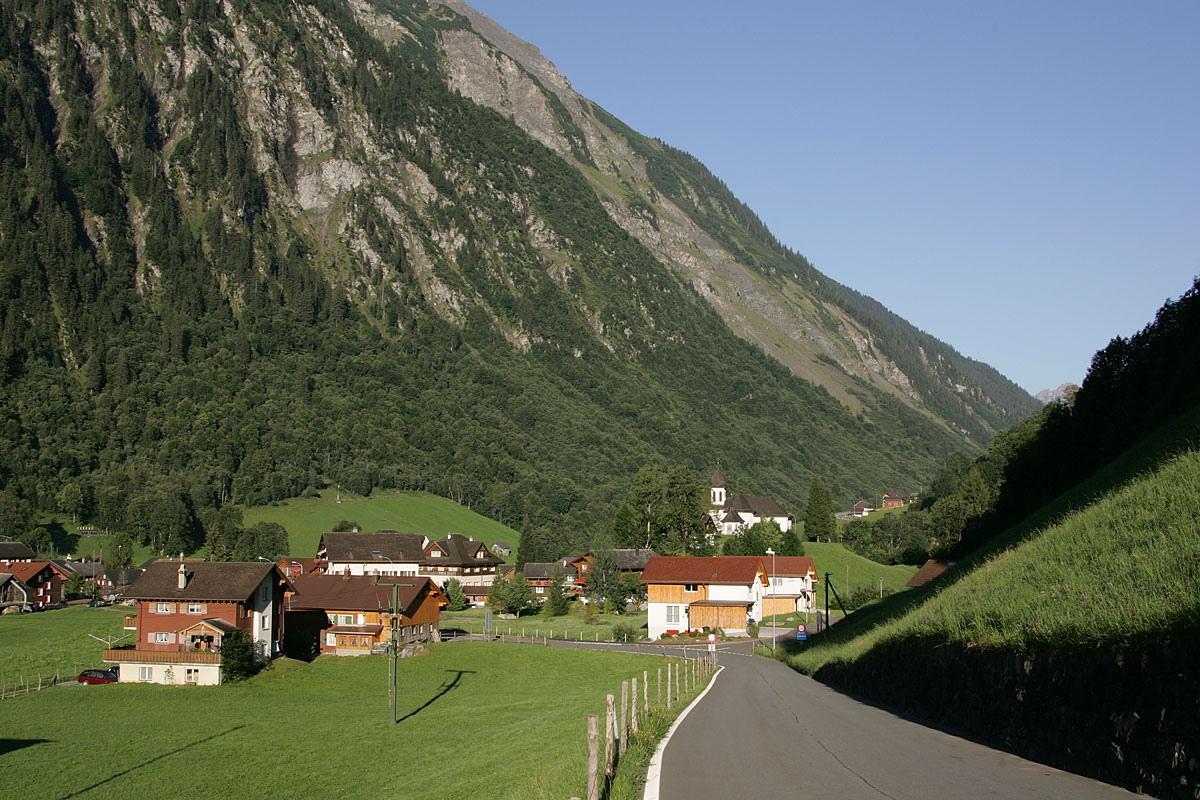 Einfahrt vom Klausenpass her in Unterschächen